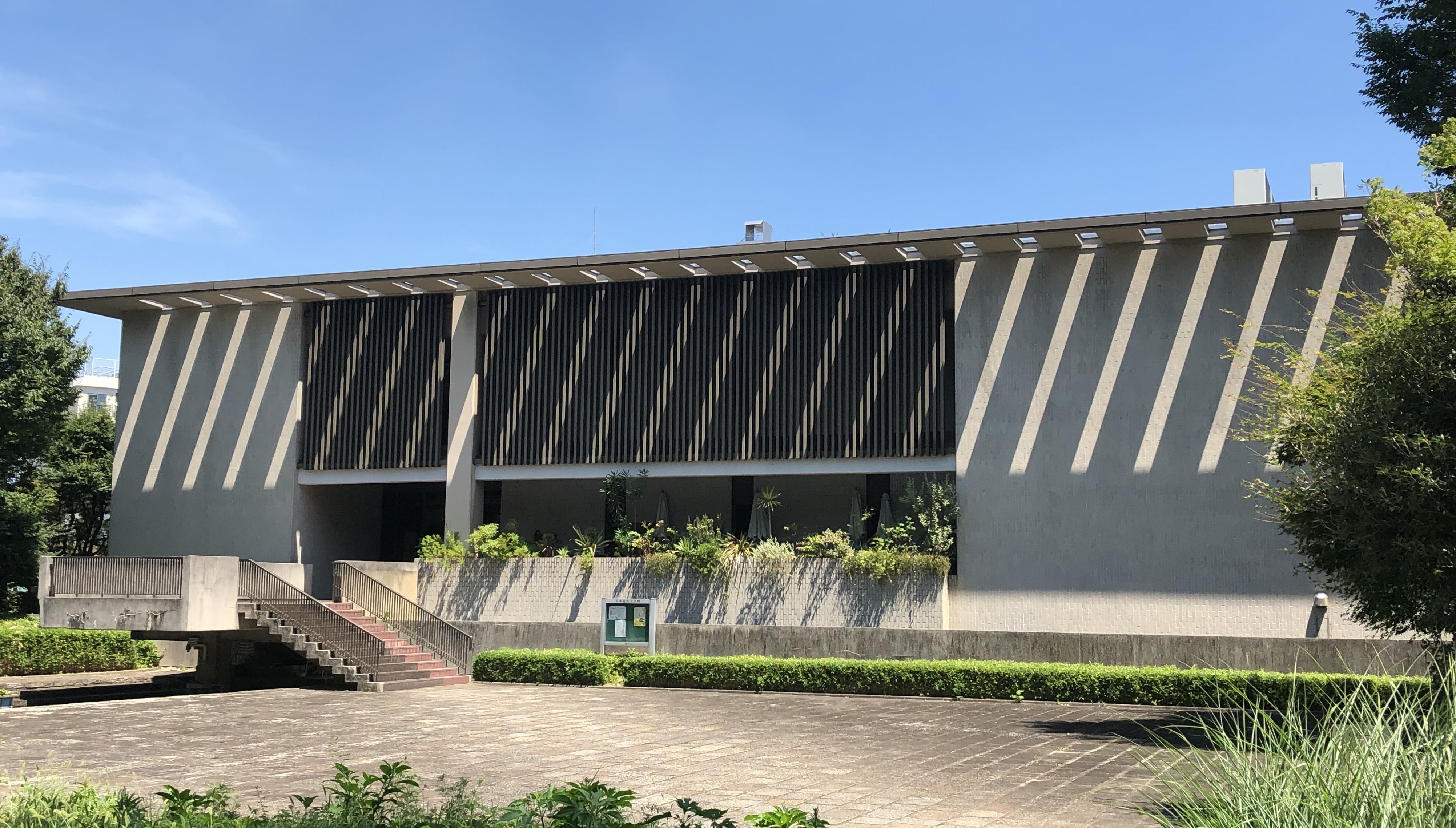 東京都目黒区駒場公園内「日本近代文学館」1966年竣工